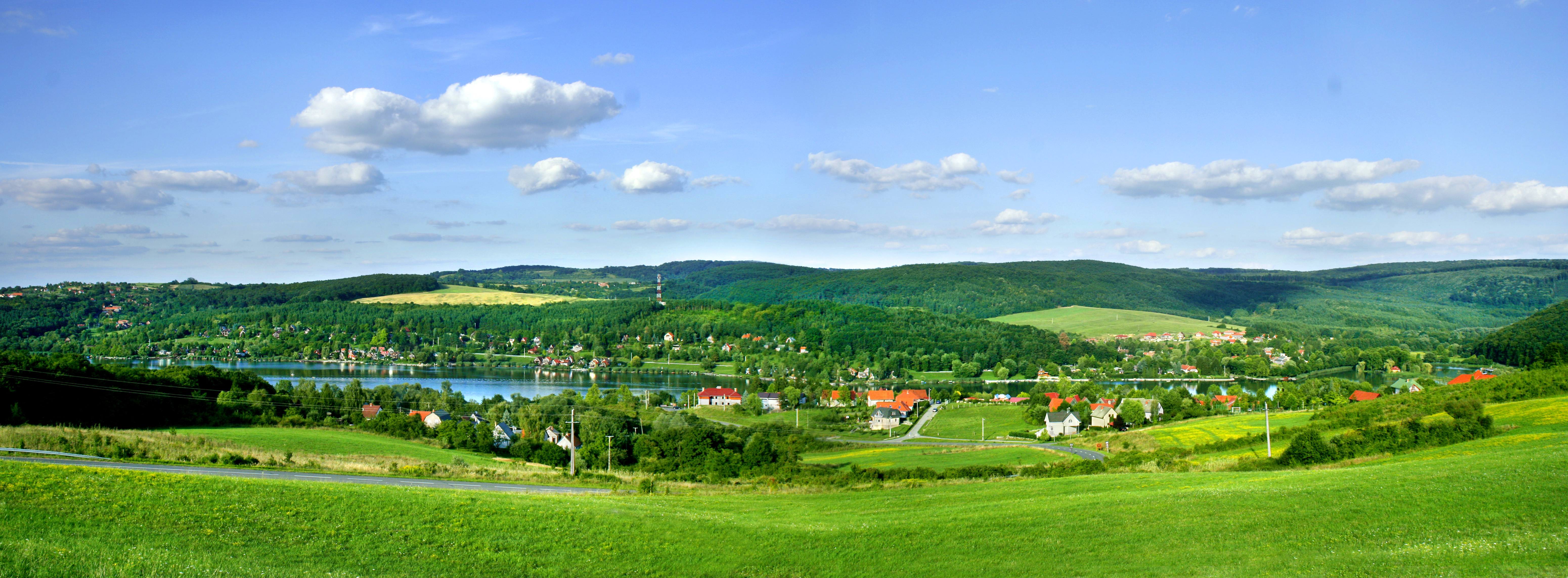 Orfű - panoráma